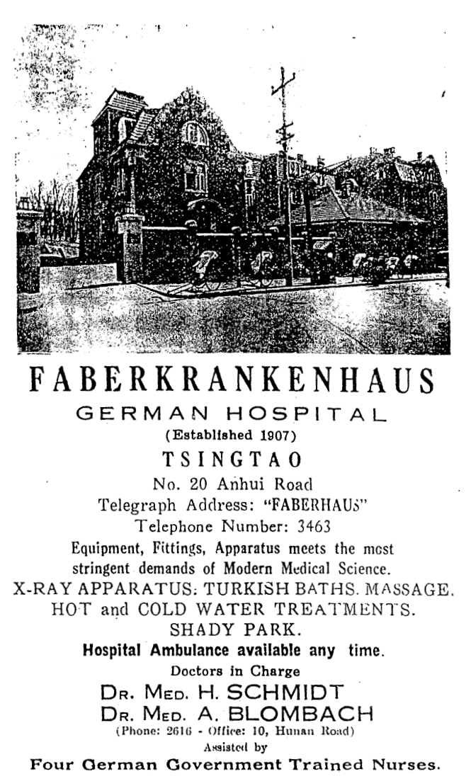 青岛福柏医院广告